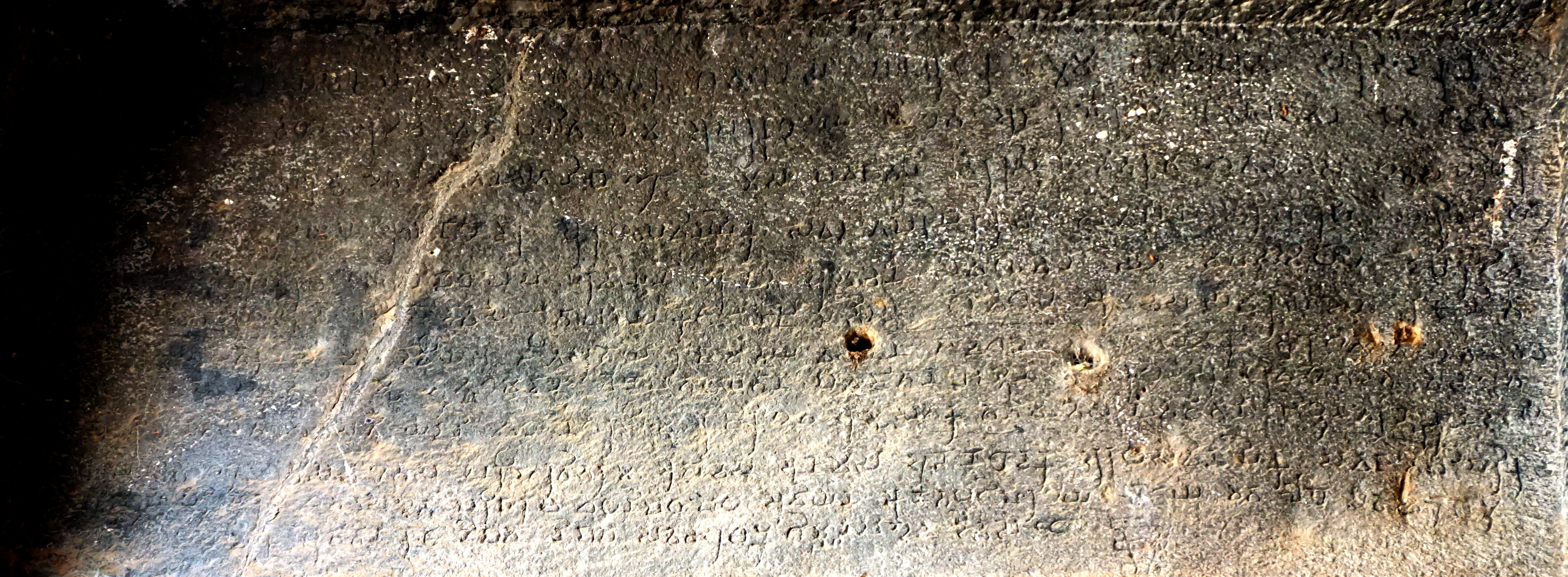 Trirasmi Caves, Nashik, India Pandavlena, Nashik, India